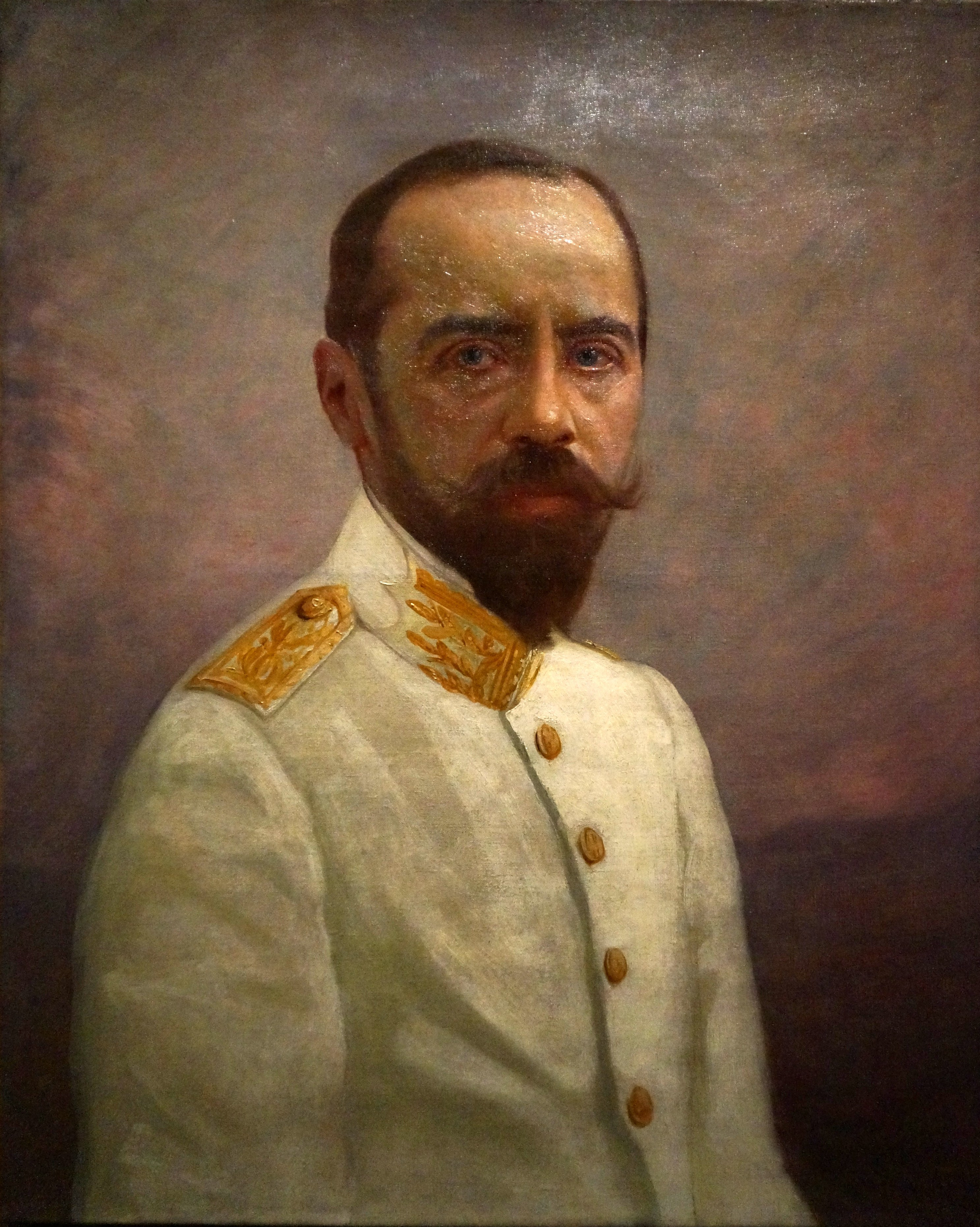 Sarraut administrateur huile sur toile de Mascré-souville, musée du quai branly.